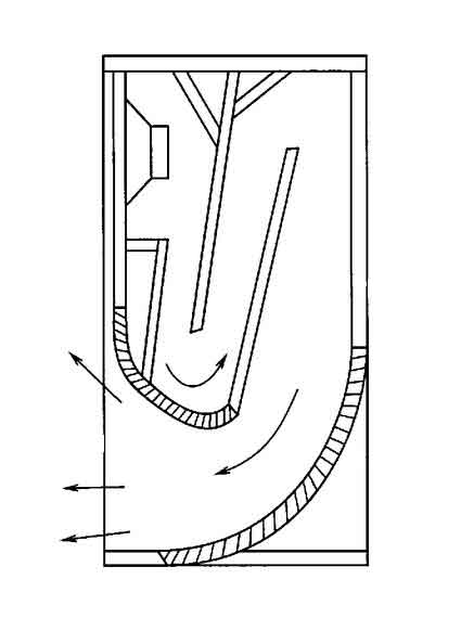 speaker